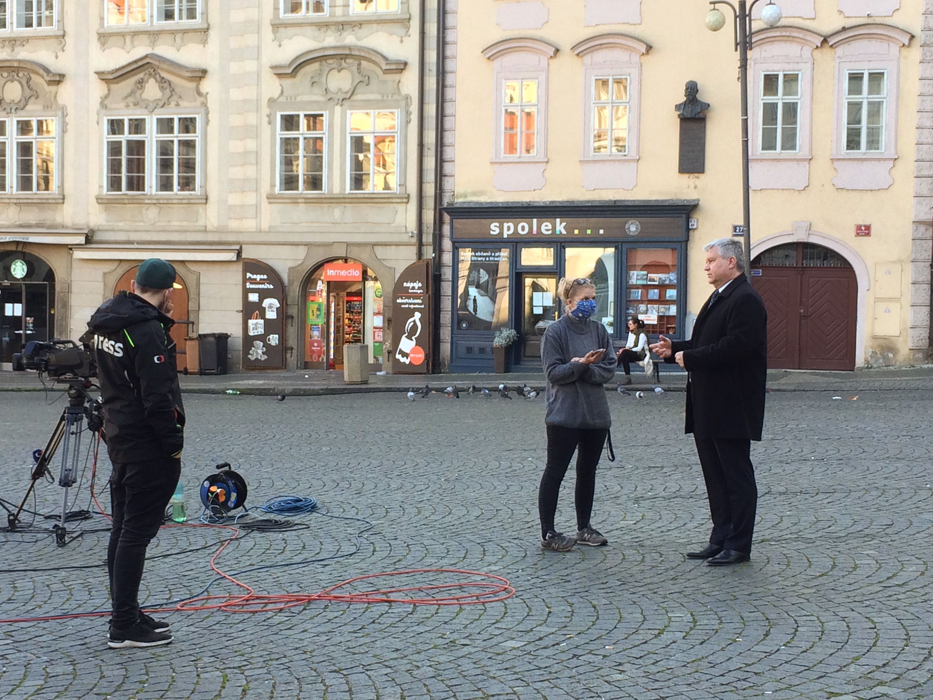 Daniel Takáč (vpravo) během přípravy Studia ČT24 na Malostranském náměstí v době koronavirové pandemie.